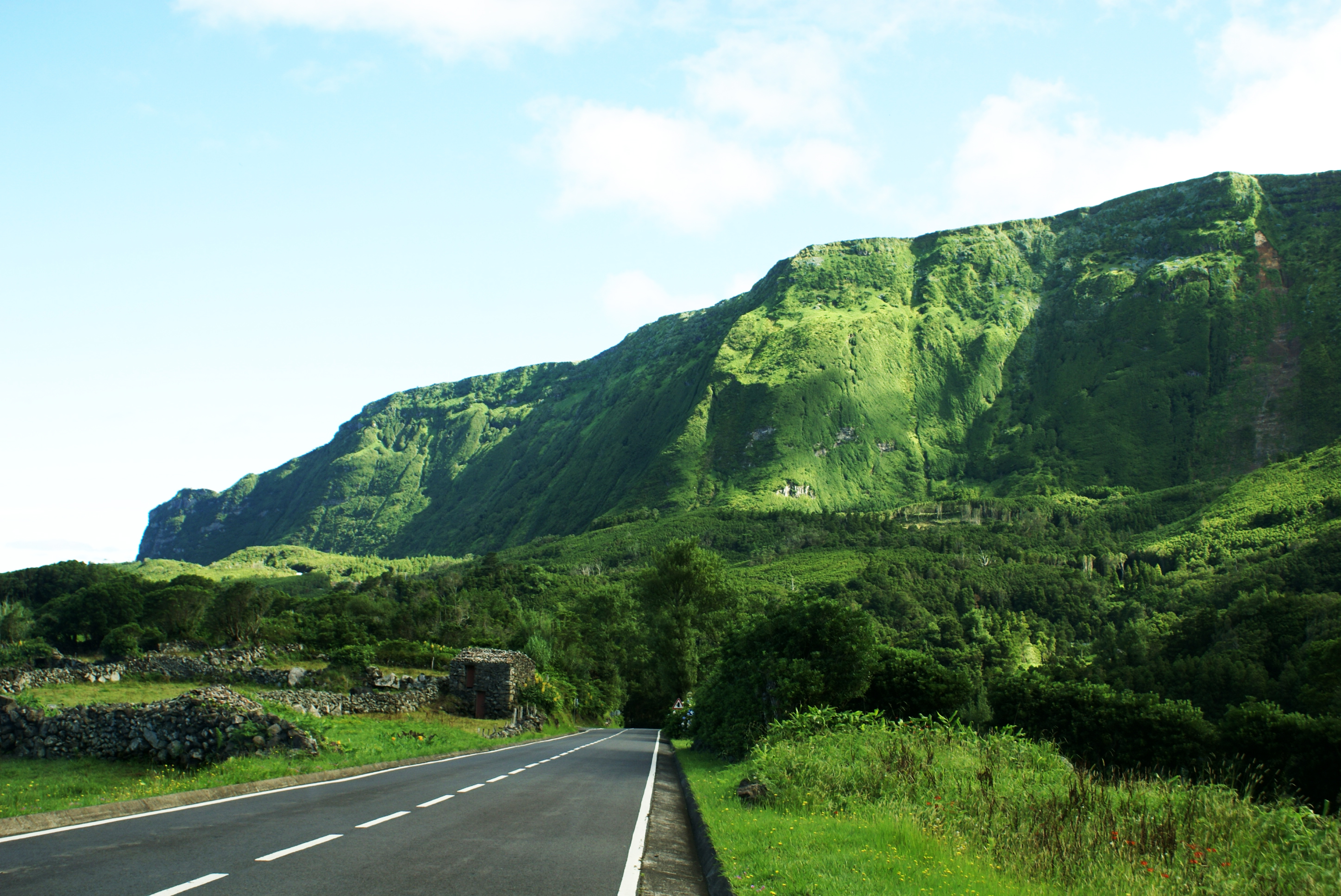 A caminho da Fajã Grande, falésias, ilha das Flores, Açores, Arquivo de Villa Maria, ilha Terceira, Açores